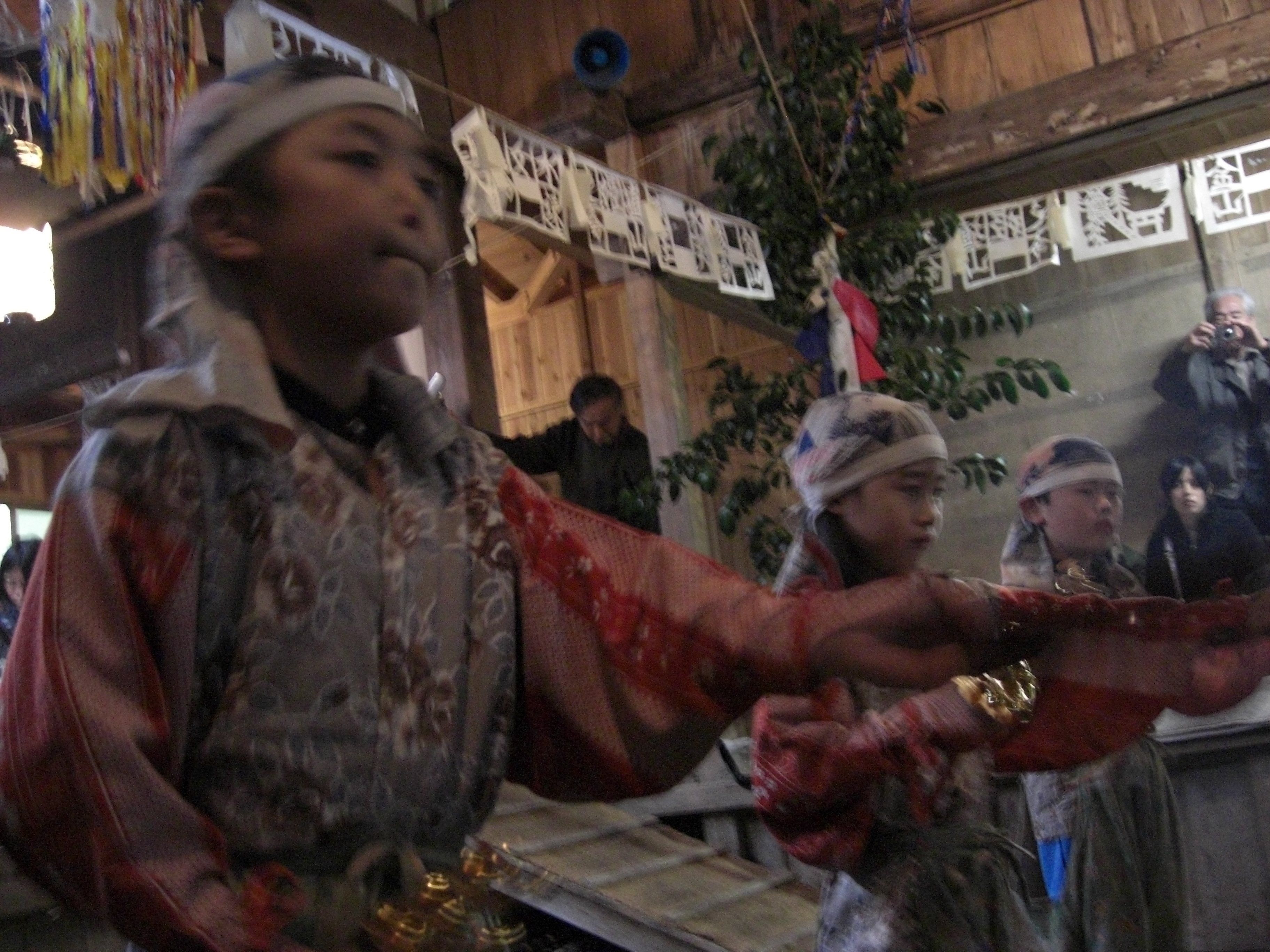 愛知県北設楽郡東栄町小林で行われている花祭（霜月神楽）。「ちゃつの舞」。